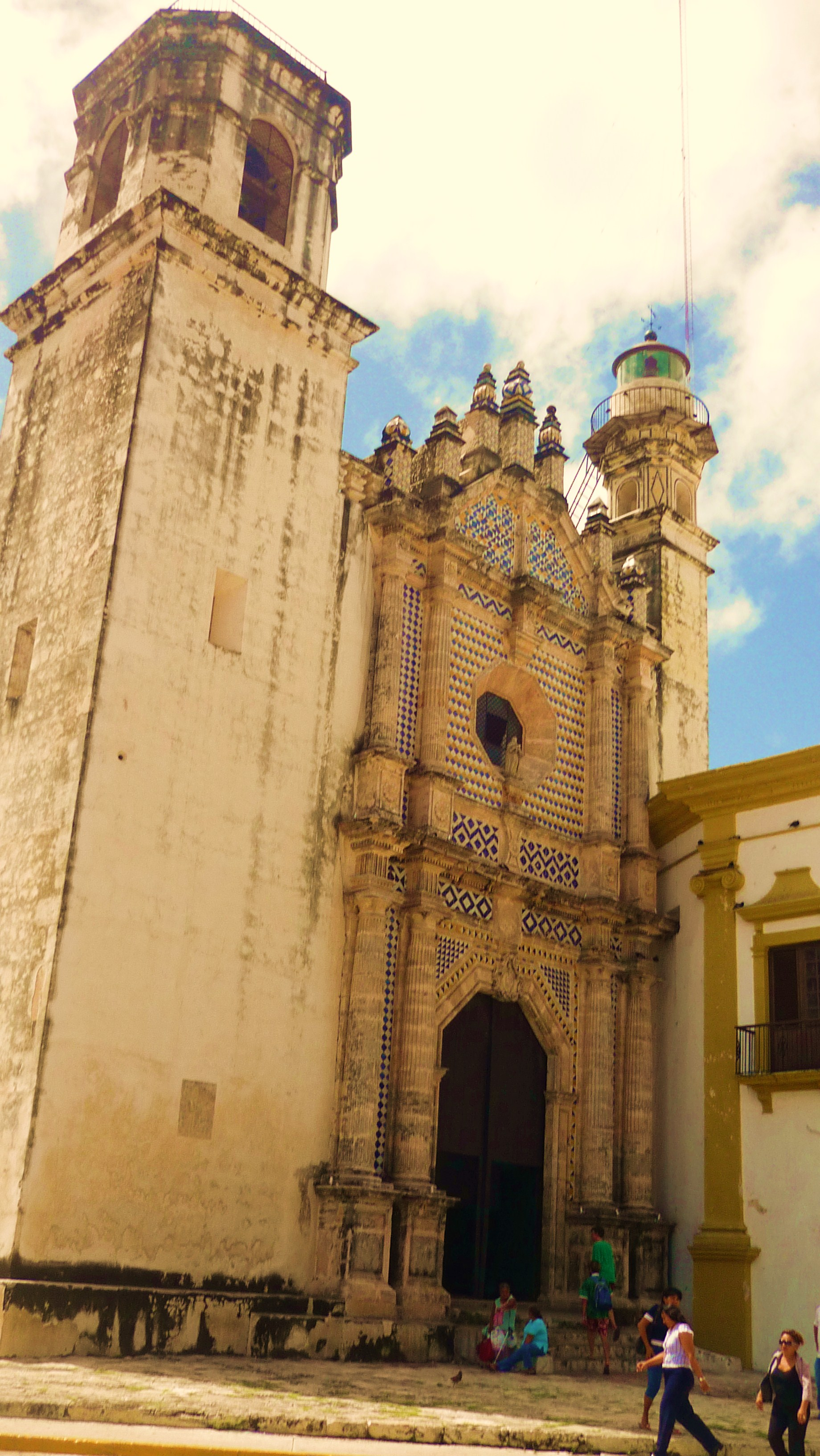 EXTEMPLO DE SAN JOSE, CAMPECHE